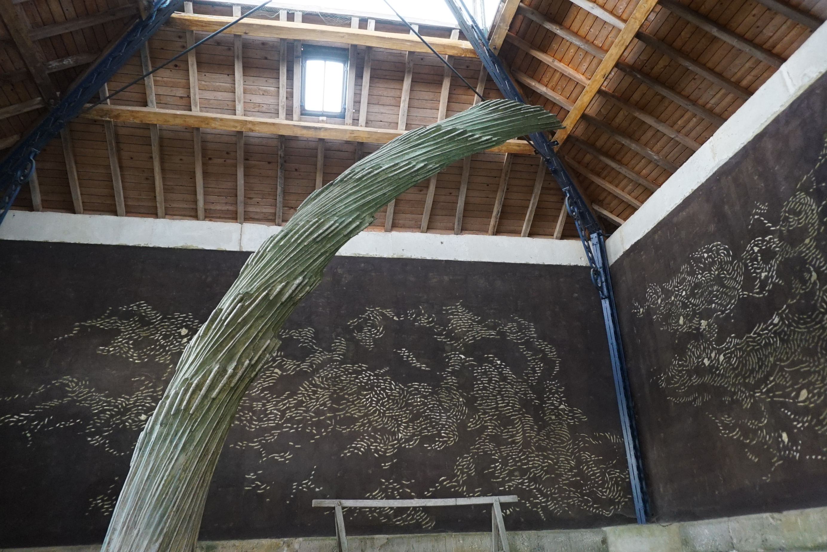 lavoir fabuliste décoré du roseau.